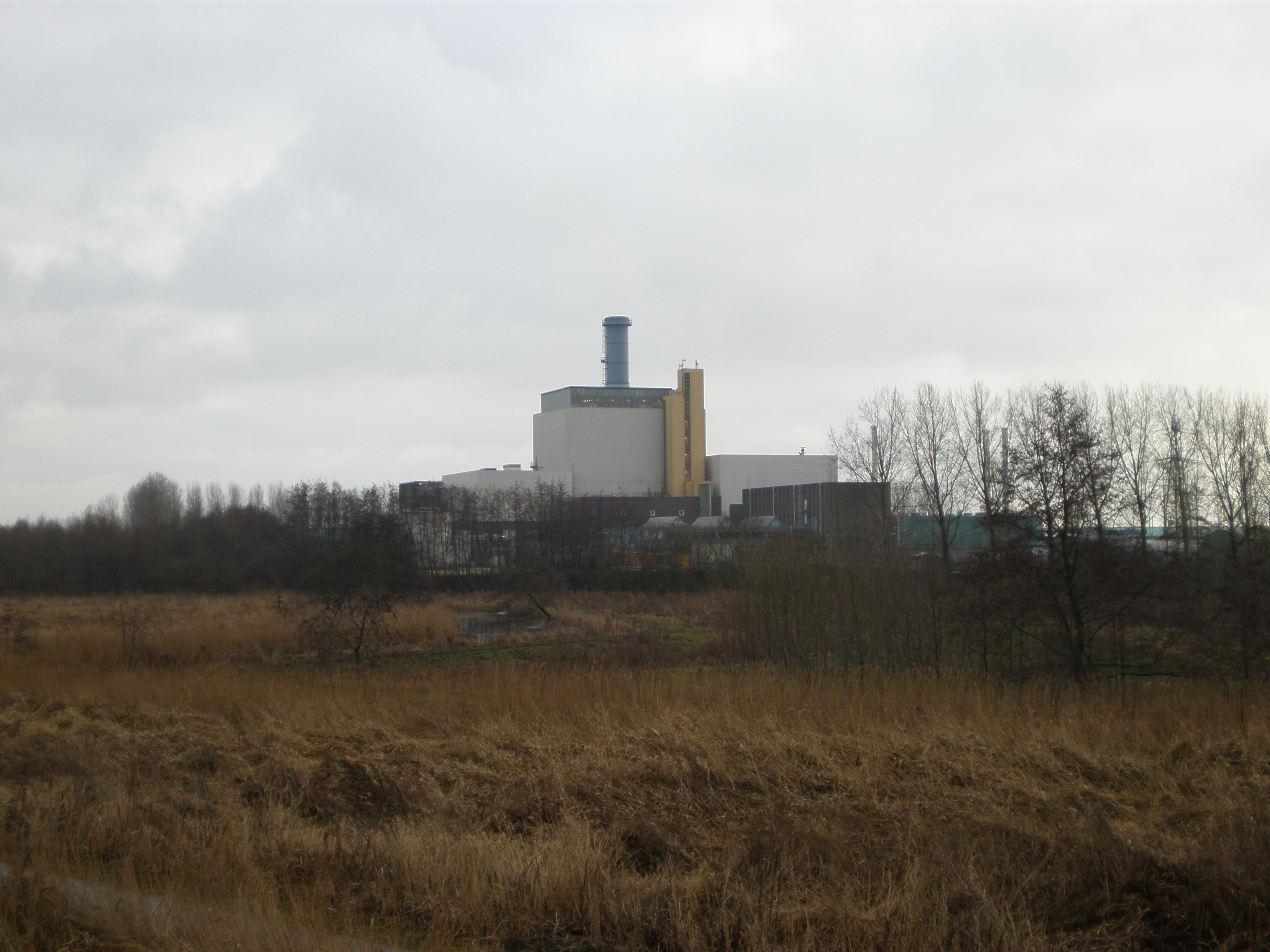 Centrale Diemen